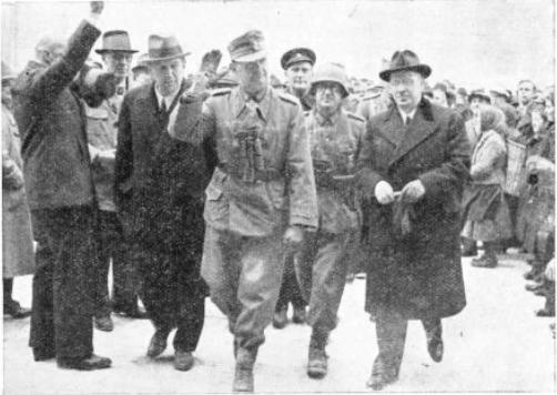 General Lanz vstopa v mestni magistrat o Celju, da prevzame oblast